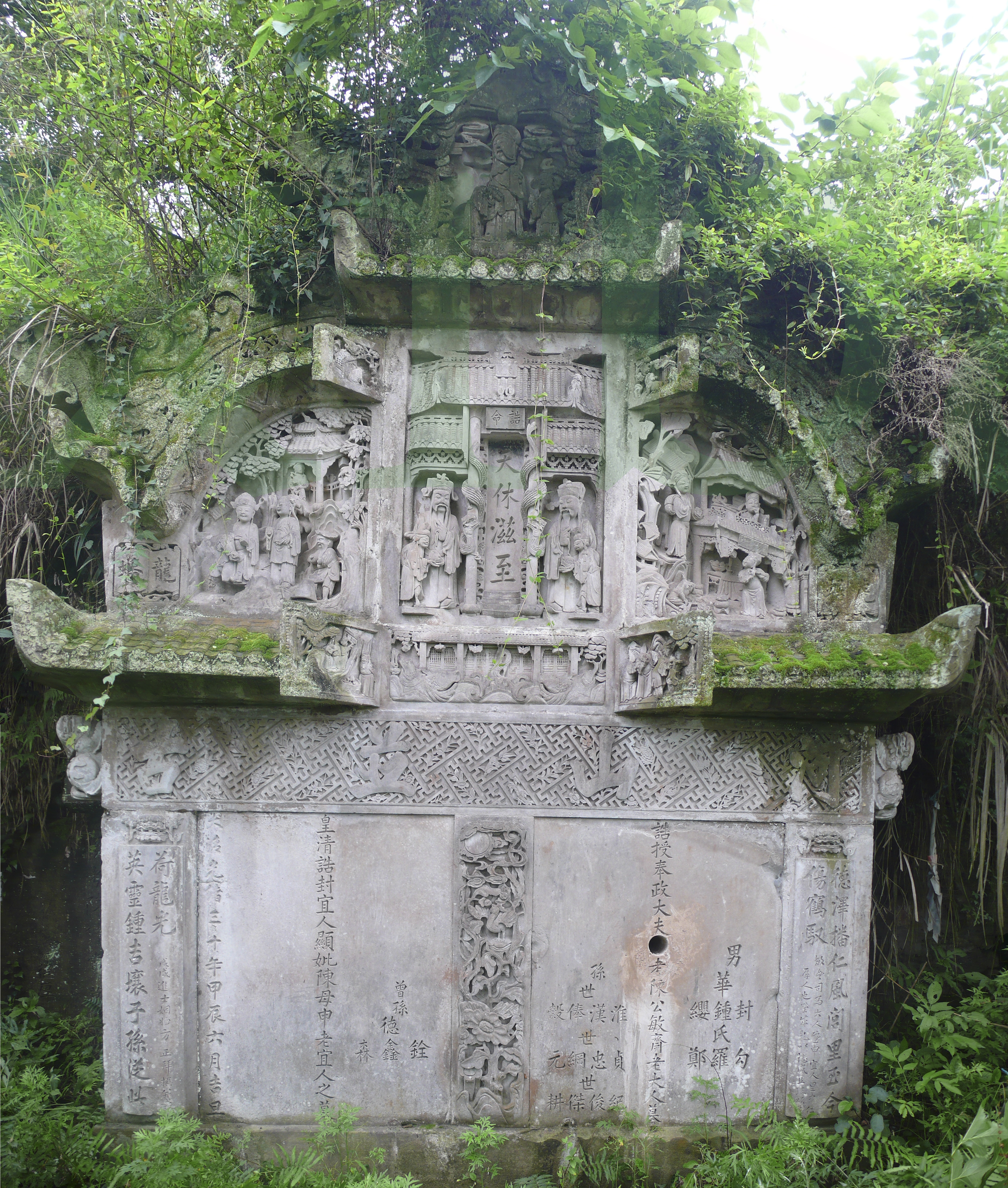 光緒戊戌科進士方正題寫墓聯